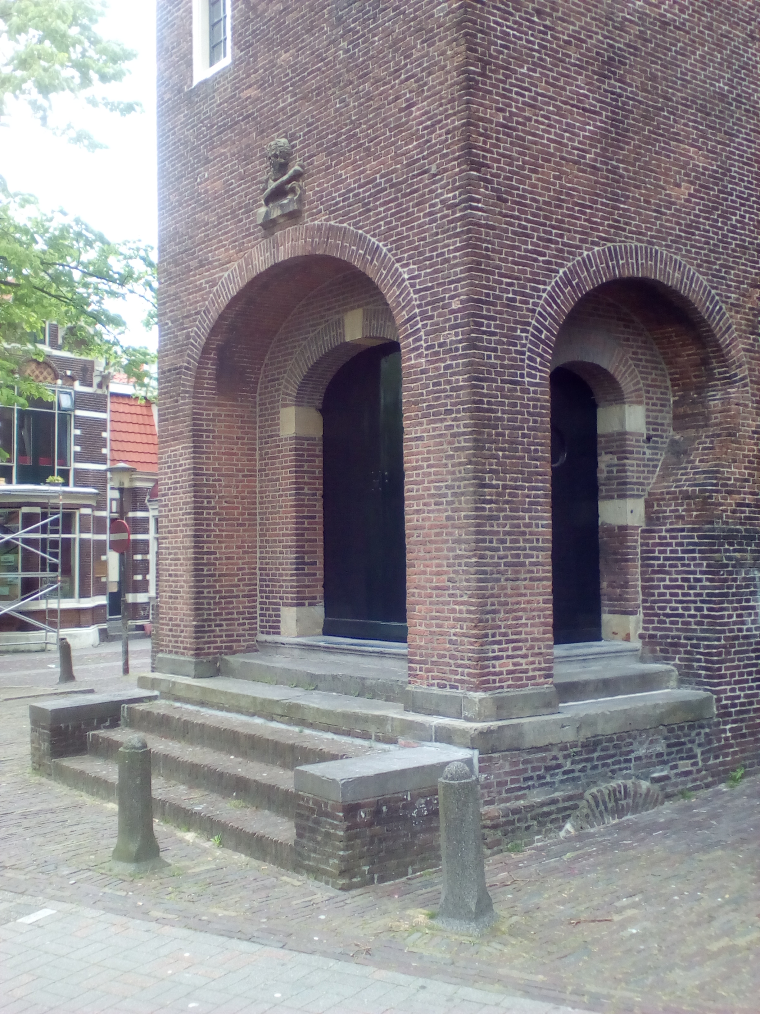 De dodendeur aan de westkant van de Bullekerk, aan de Dorst.